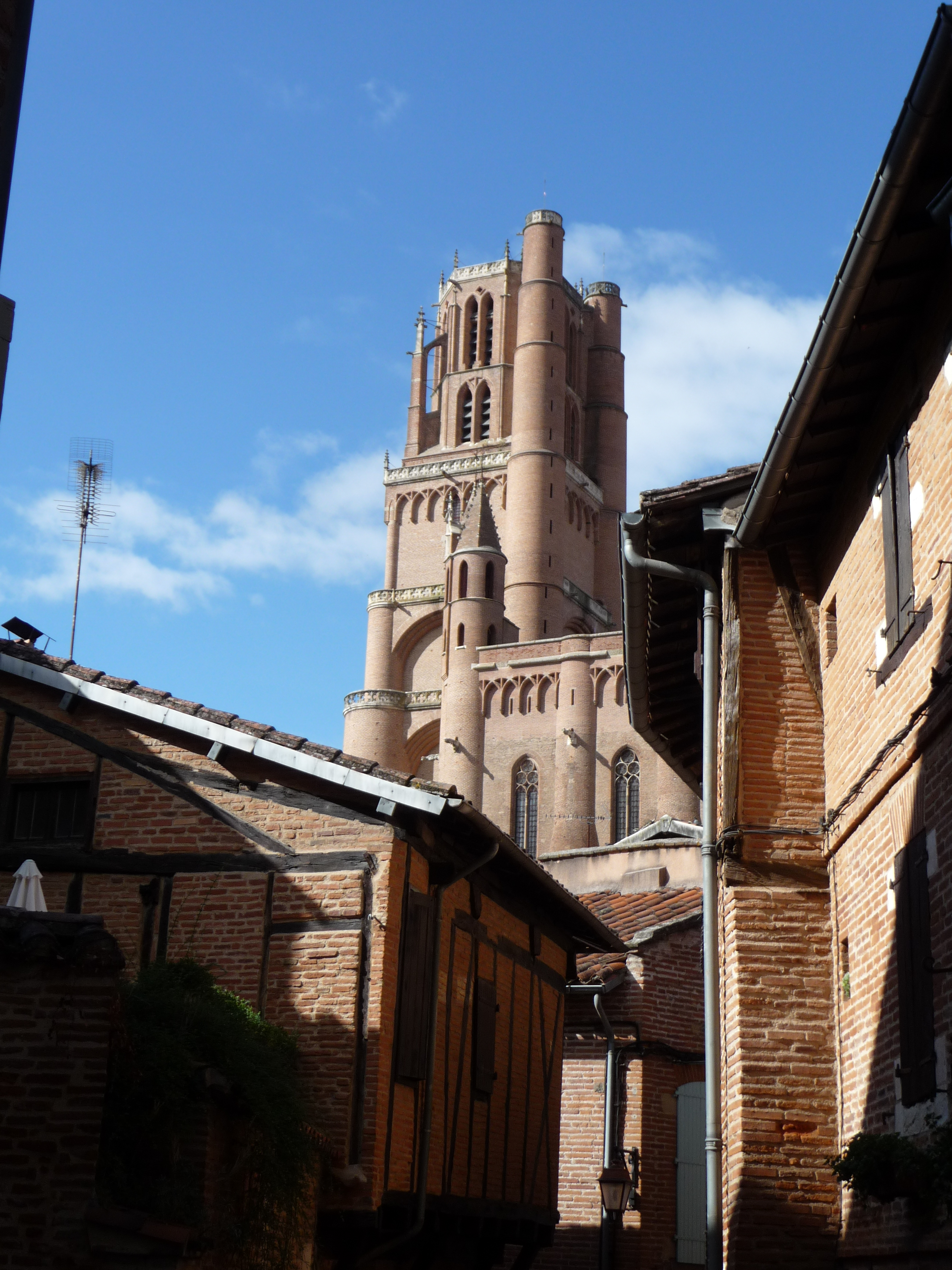 Cathédrale Sainte-Cécile .